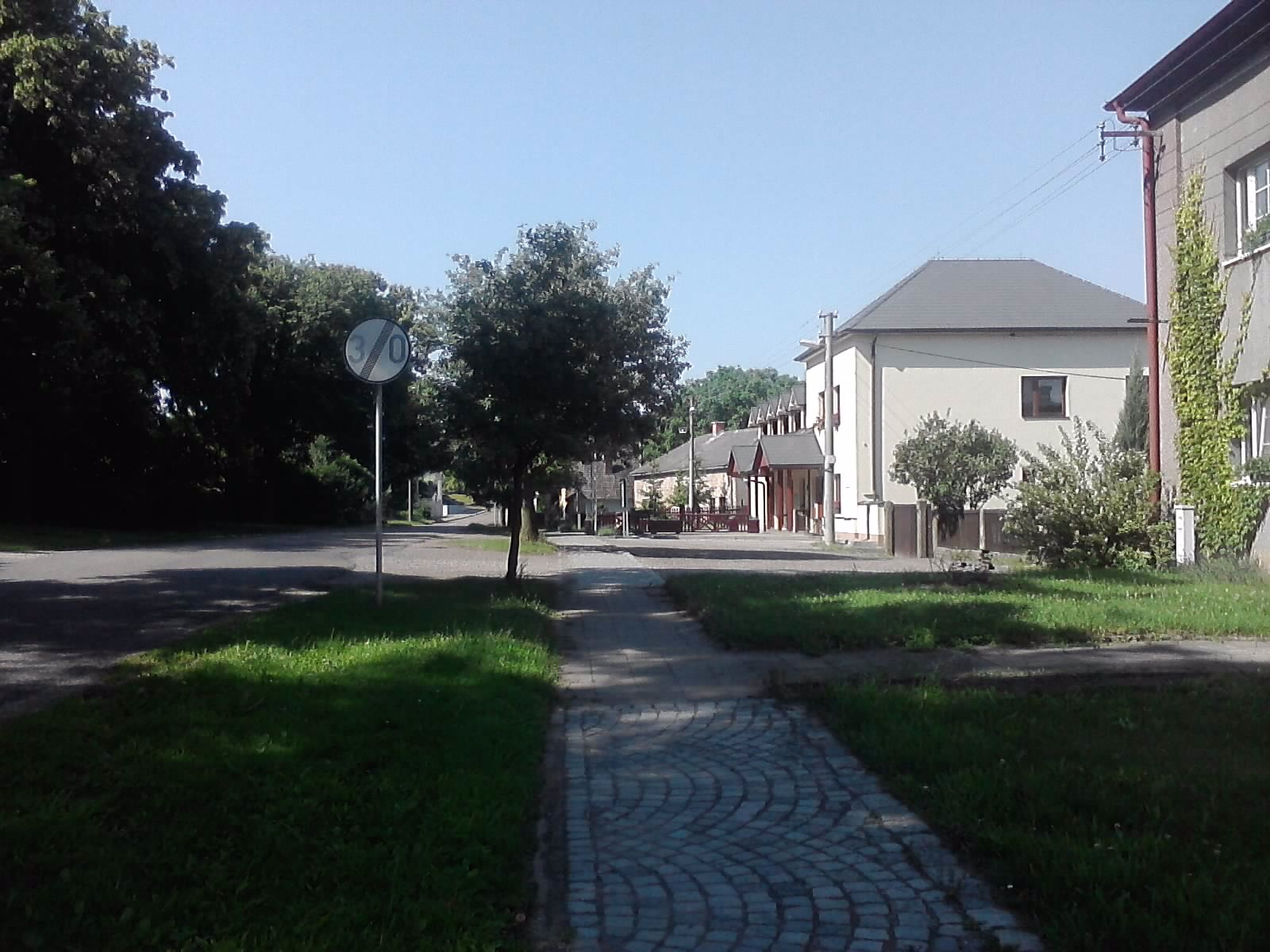 Obecní úřad